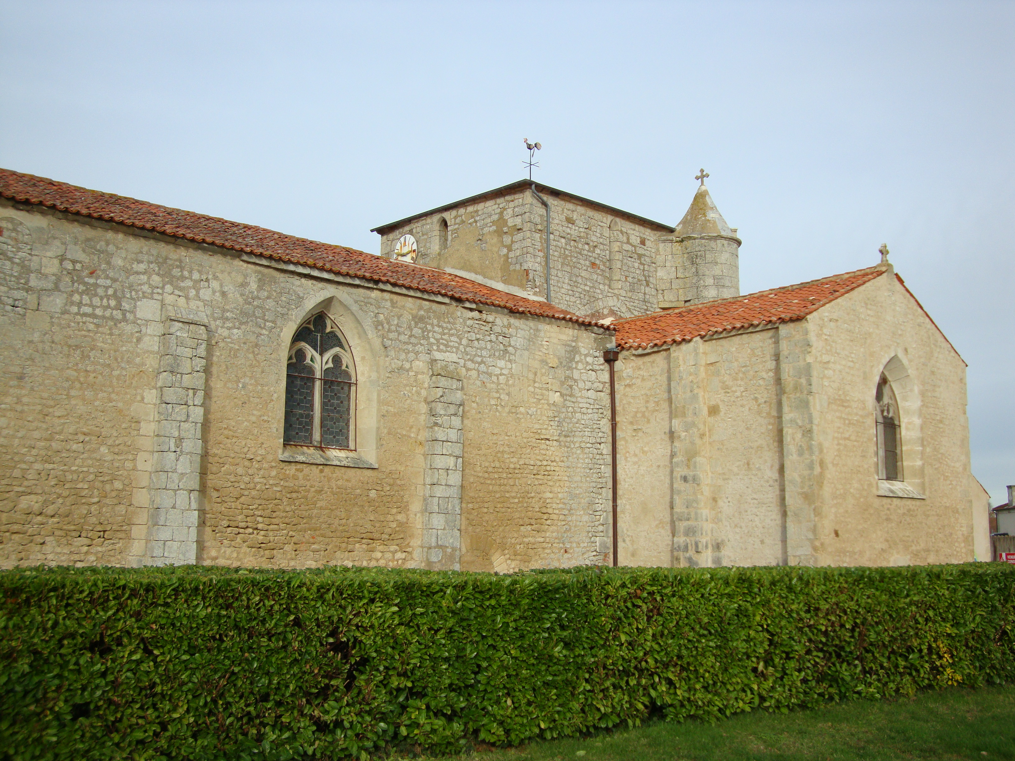 Église Saint-Julien de Petosse, (Inscrit, 1991) .